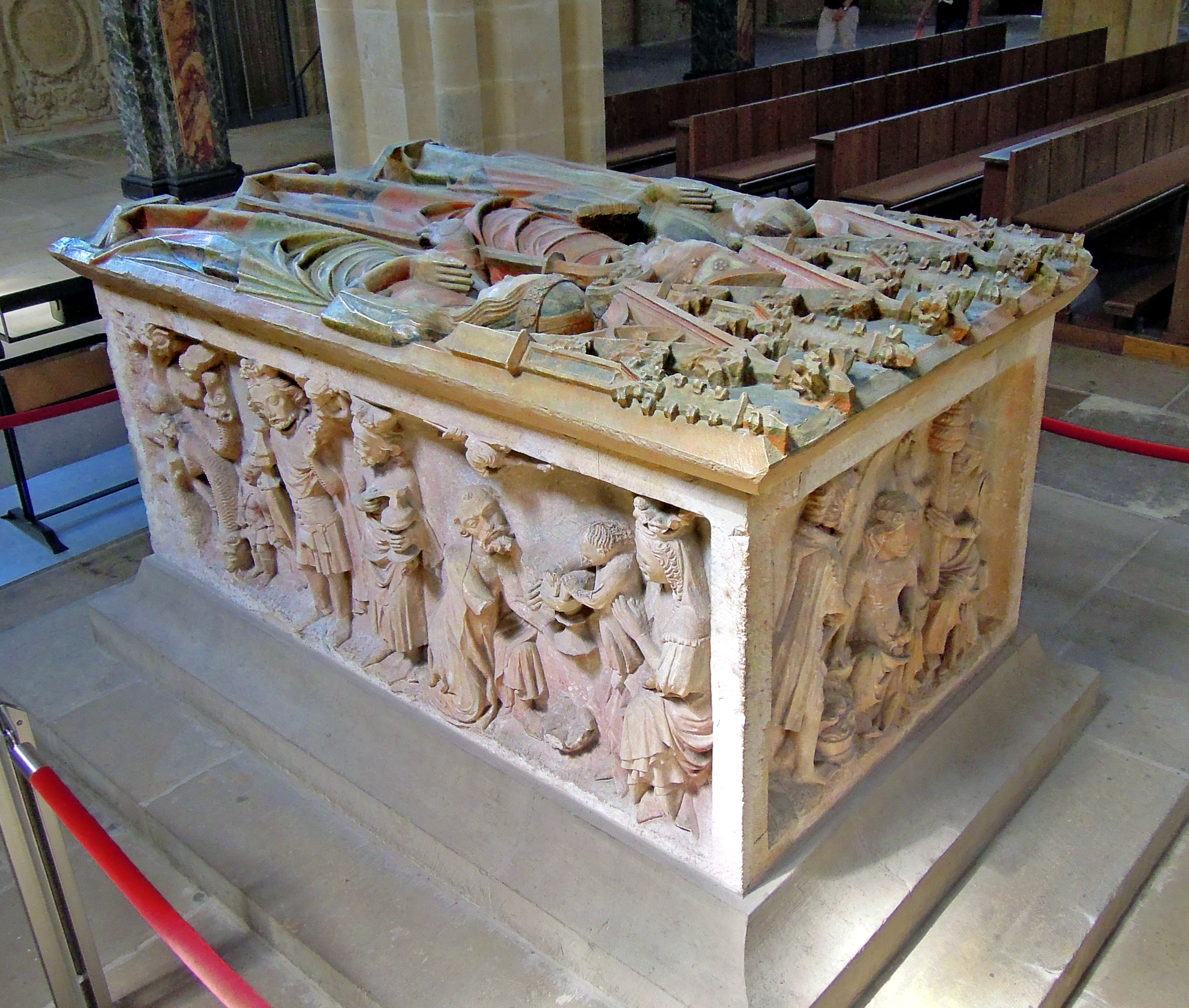 Sarkophag